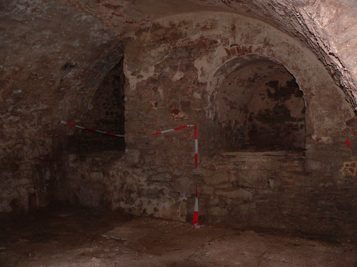 Altes Brennhaus in Fürstenberg, Kellergewölbe im Untergeschoss, evt. Brennöfen